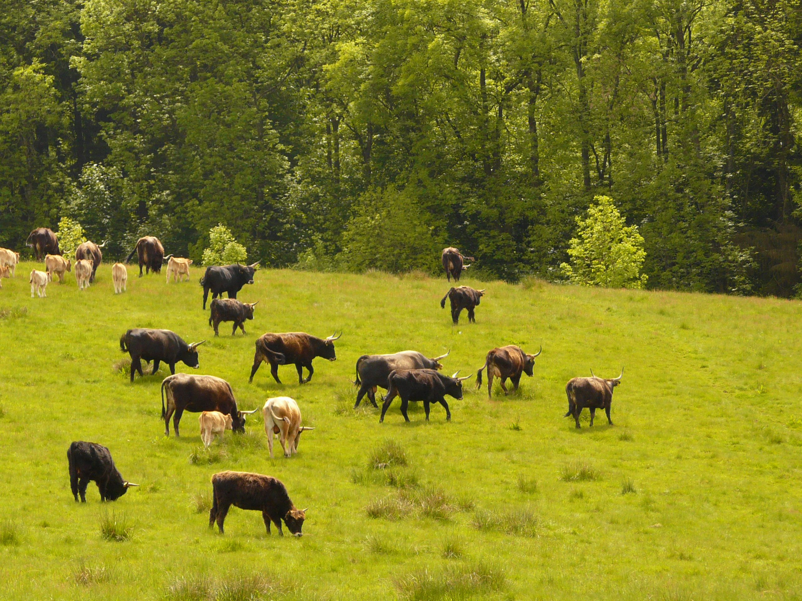 Eine Herde Heckrinder im „Wilde-Weiden"-Projekt des NSG Stilleking bei Lüdenscheid